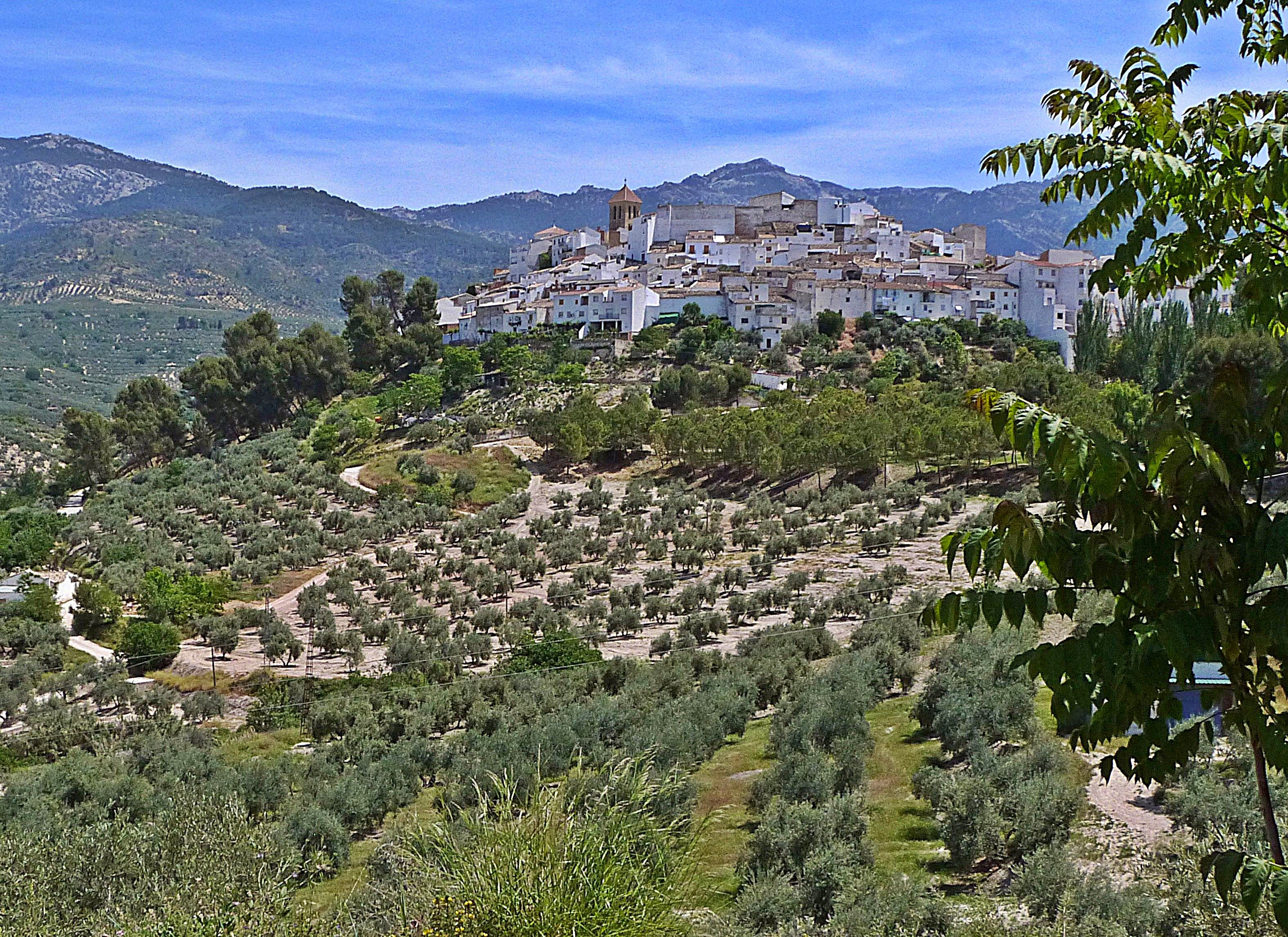 Quesada